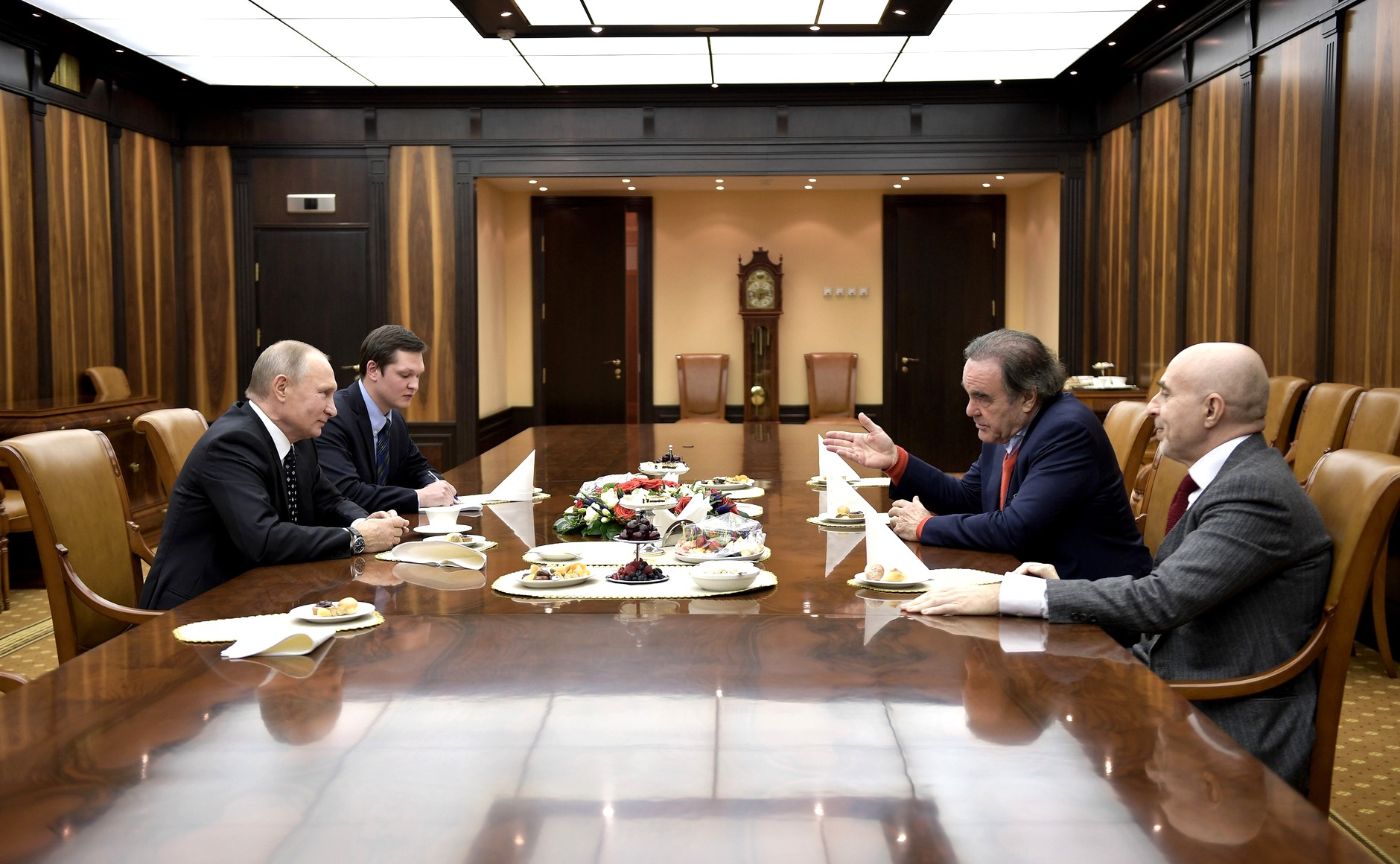 Встреча Президента России Владимира Путина с американским кинорежиссёром, сценаристом и продюсером Оливером Стоуном